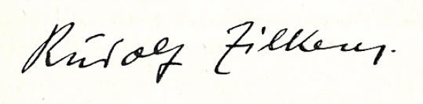 Signatur des deutschen Schriftstellers und Politikers Rudolf Zilkens (NSDAP).